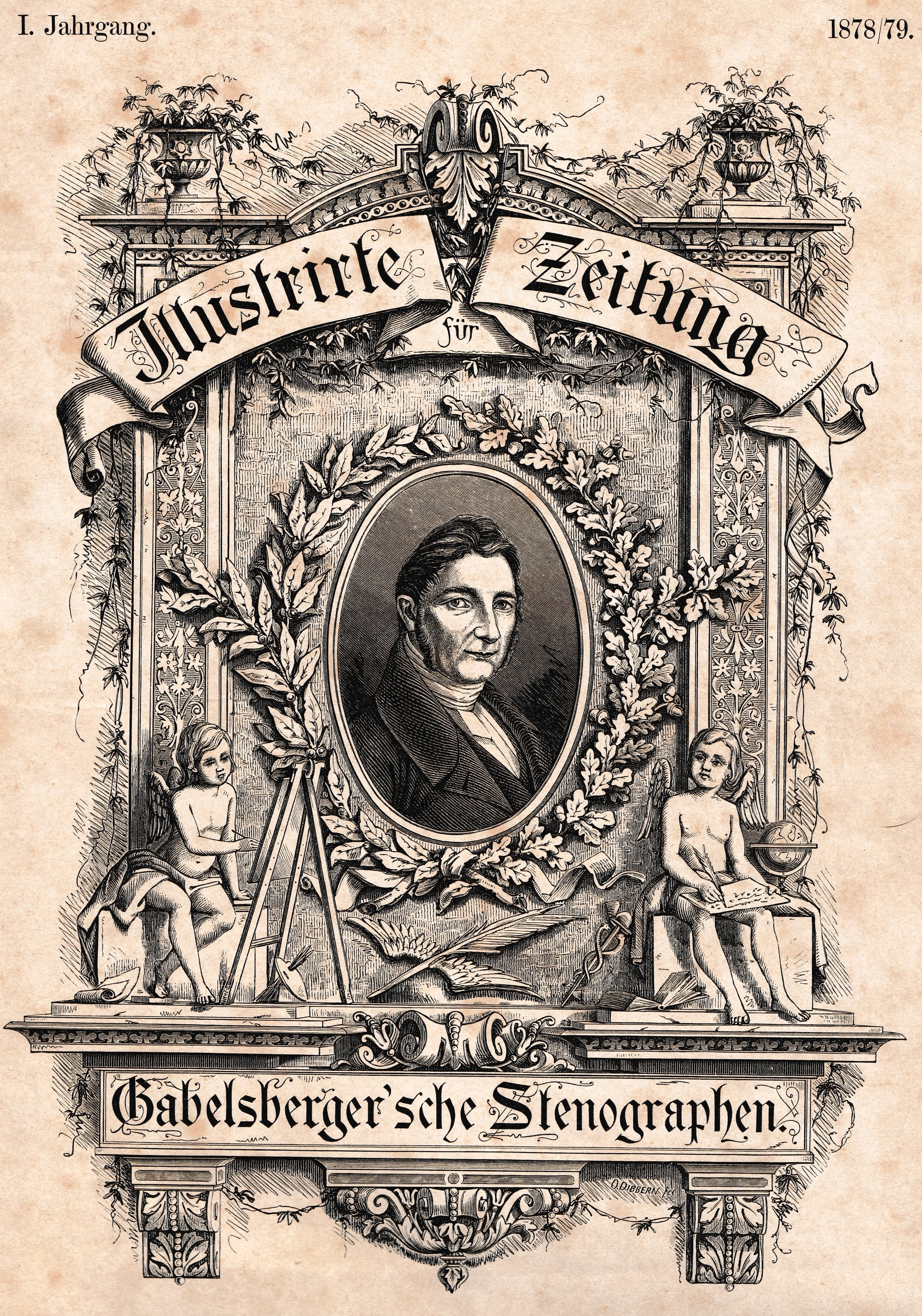 Titelblatt der Zeitschrift Illustrierte Zeitung für Gabelsberger Stenografen von 1878